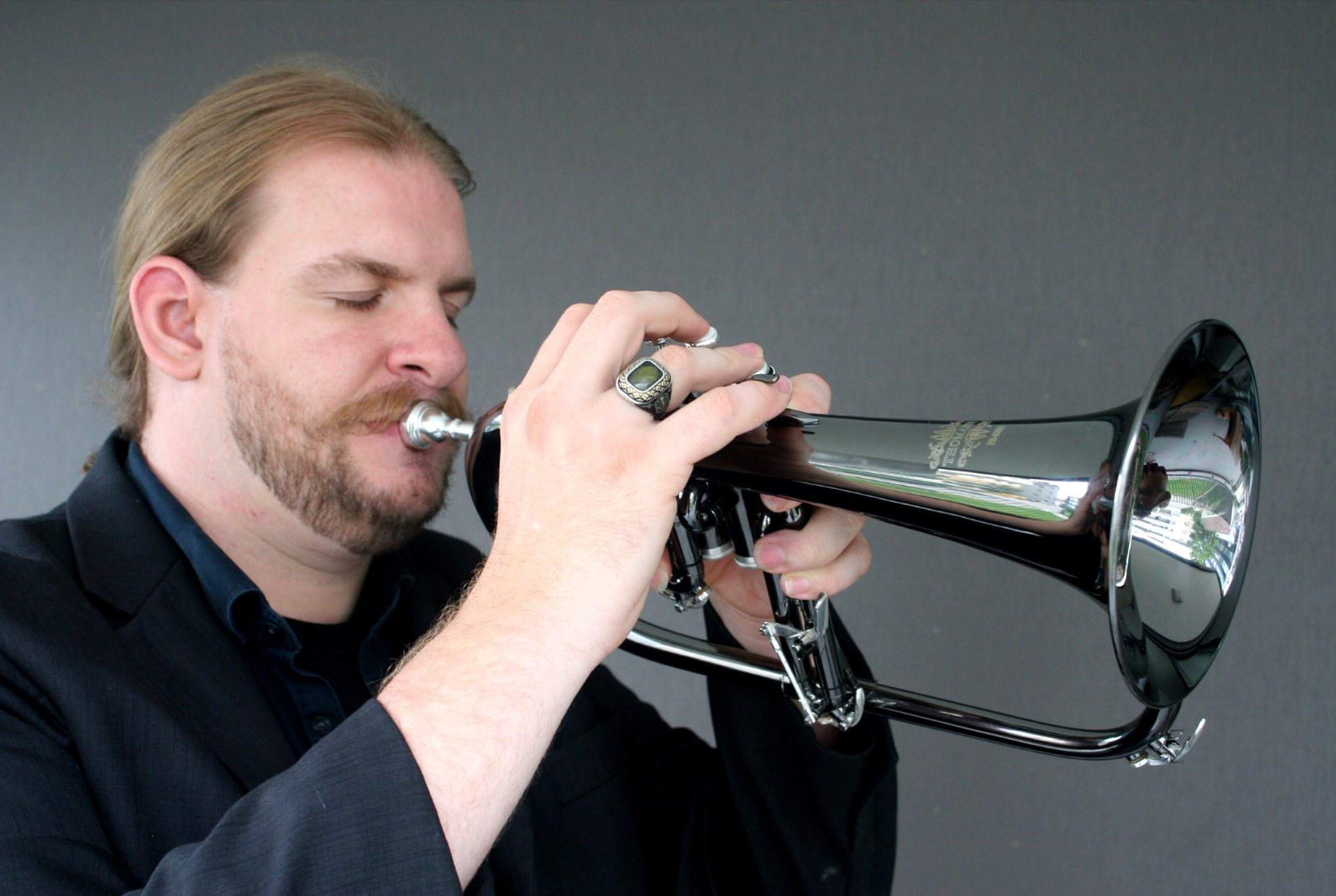 Philipp Rellstab 2012